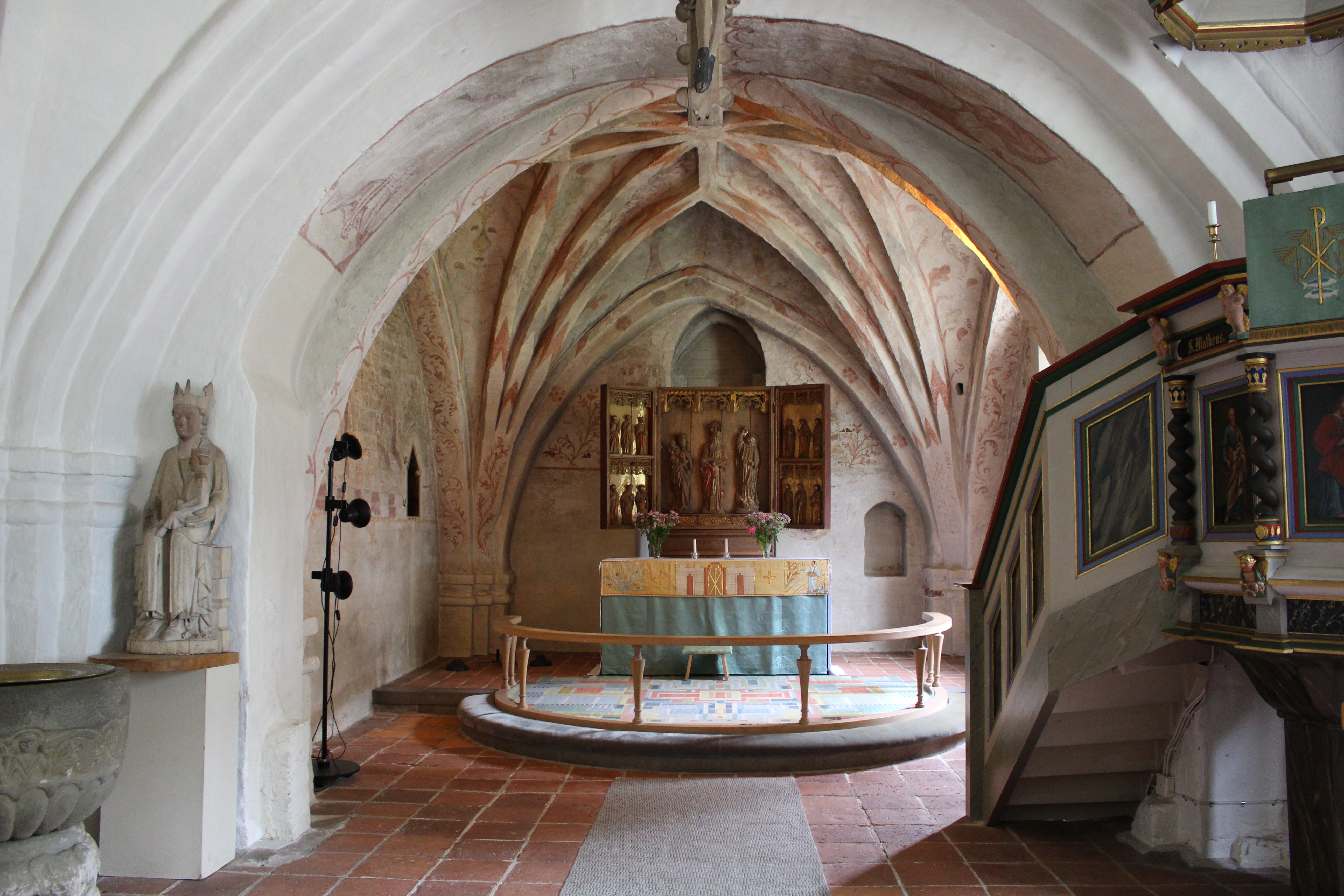 Kor och altare i Kiaby kyrka.